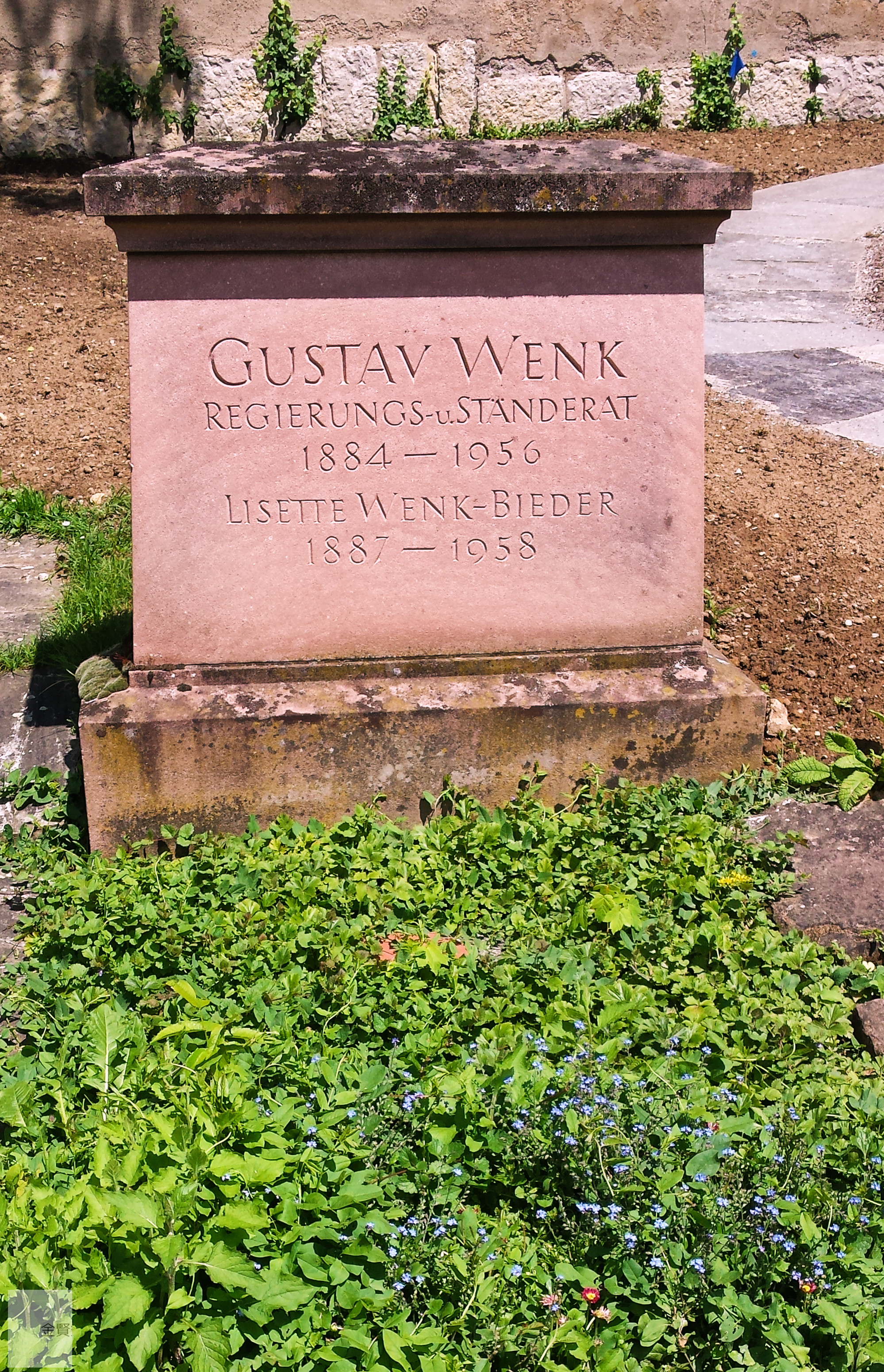 Grabstein von Gustave und Lisette Wenk-Bieder in Bettingen BS